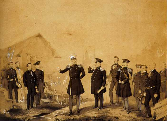 Николай I на строительных работах. 1853 Внизу справа подпись и дата: ZICHY 1853 Бумага желтая; черная акварель, белила. 303 х 408 (в свету) Происхождение: пост, в 1979; ранее в составе бывшего Исторического отдела ГМЭ Инв. № ЭРР-8031 Литература: Публикуется впервые Николай I изображен в центре группы инженеров и чиновников на строительстве пригородного дома в окрестностях Петербурга (вероятно, в Петергофе). Второй справа от императора архитектор А.И. Штакеншнейдер.